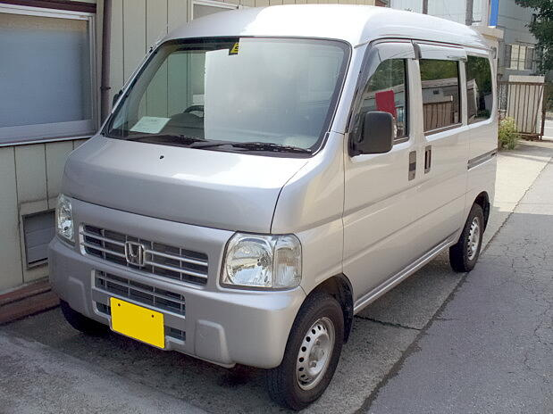 ホンダ・アクティバン（3代目）